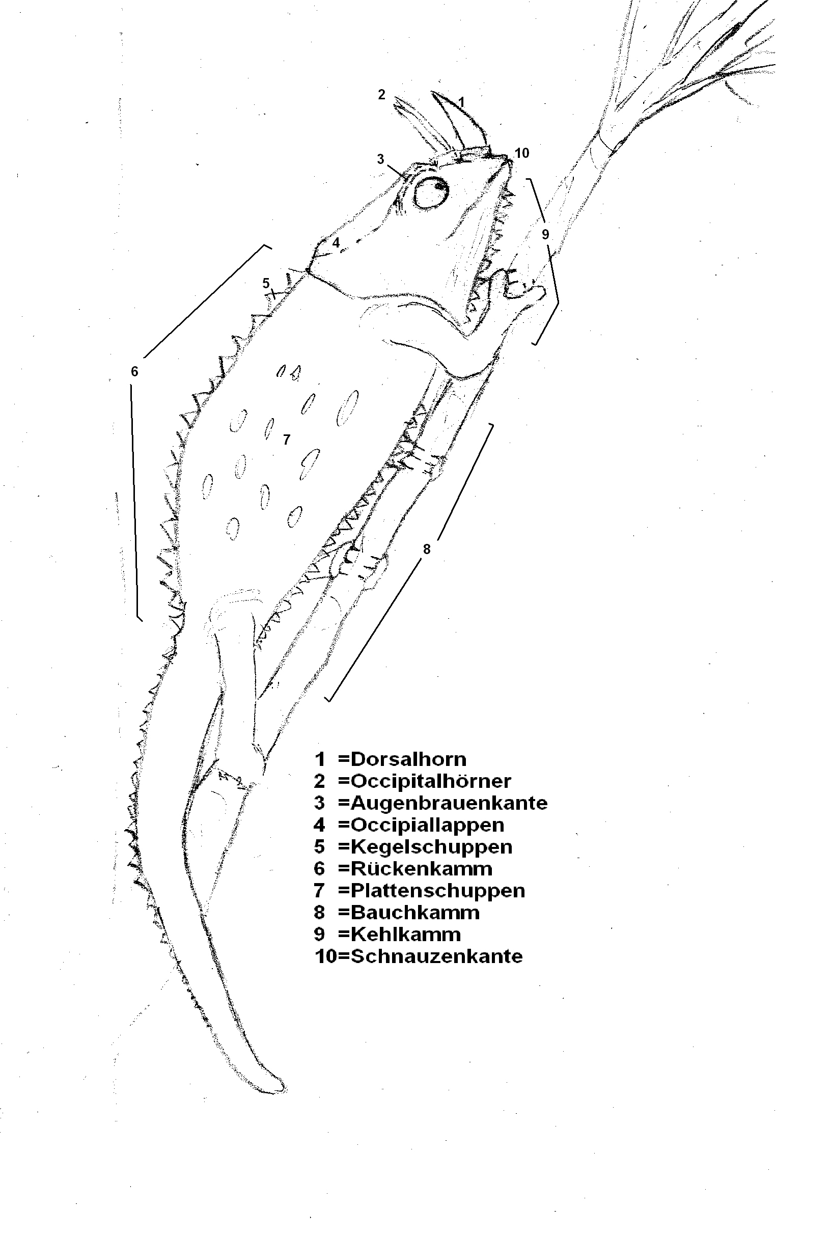 Beschreibung: Körperbau eines Chamäleons Quelle: selbst gezeichnet/self-drawed Datum: 5. November 2006 Autor: Bigfrog Erlaubnis: CC-BY-SA-2.5